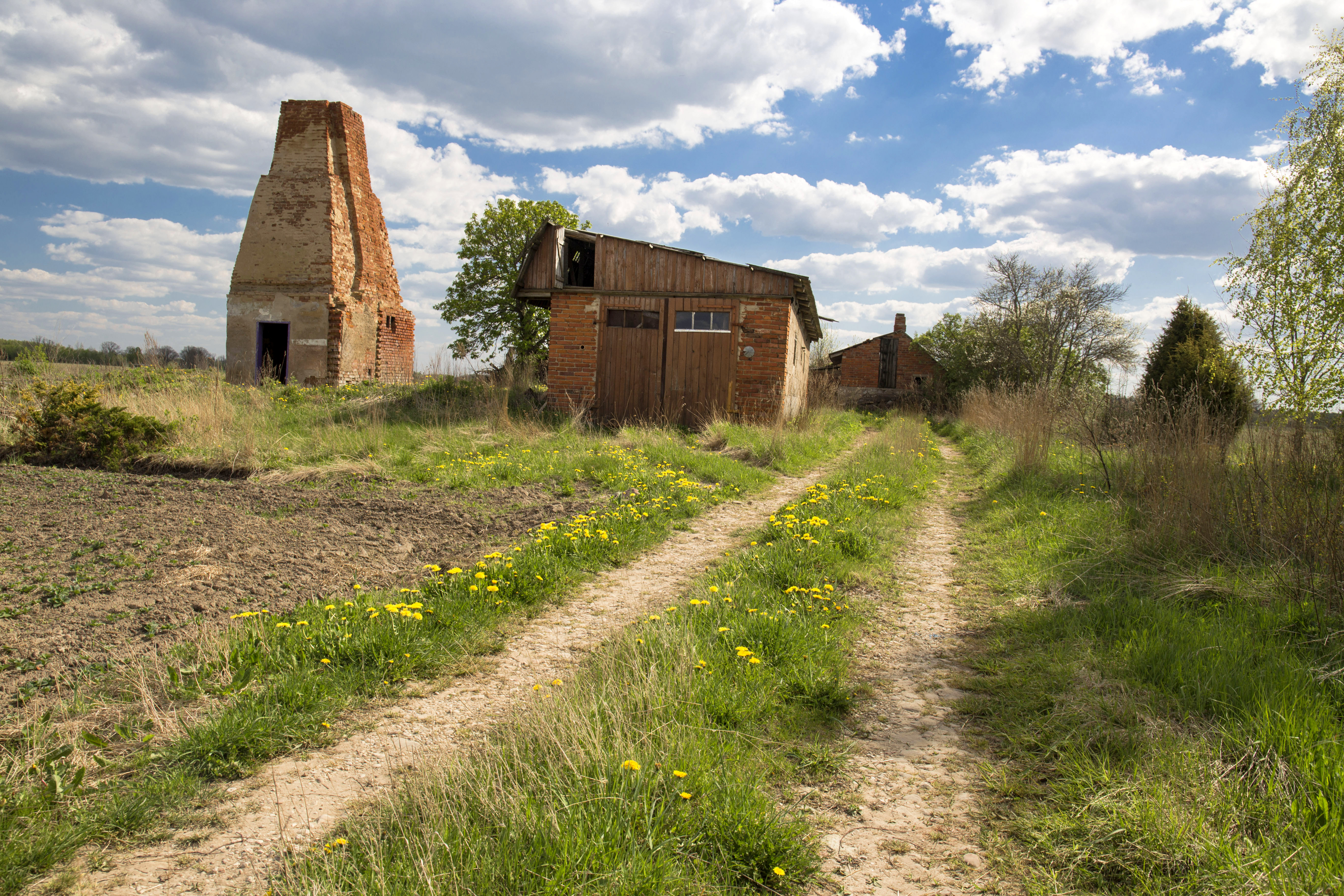 Prūšu ciems